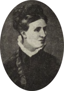 Filipina Płaskowicka